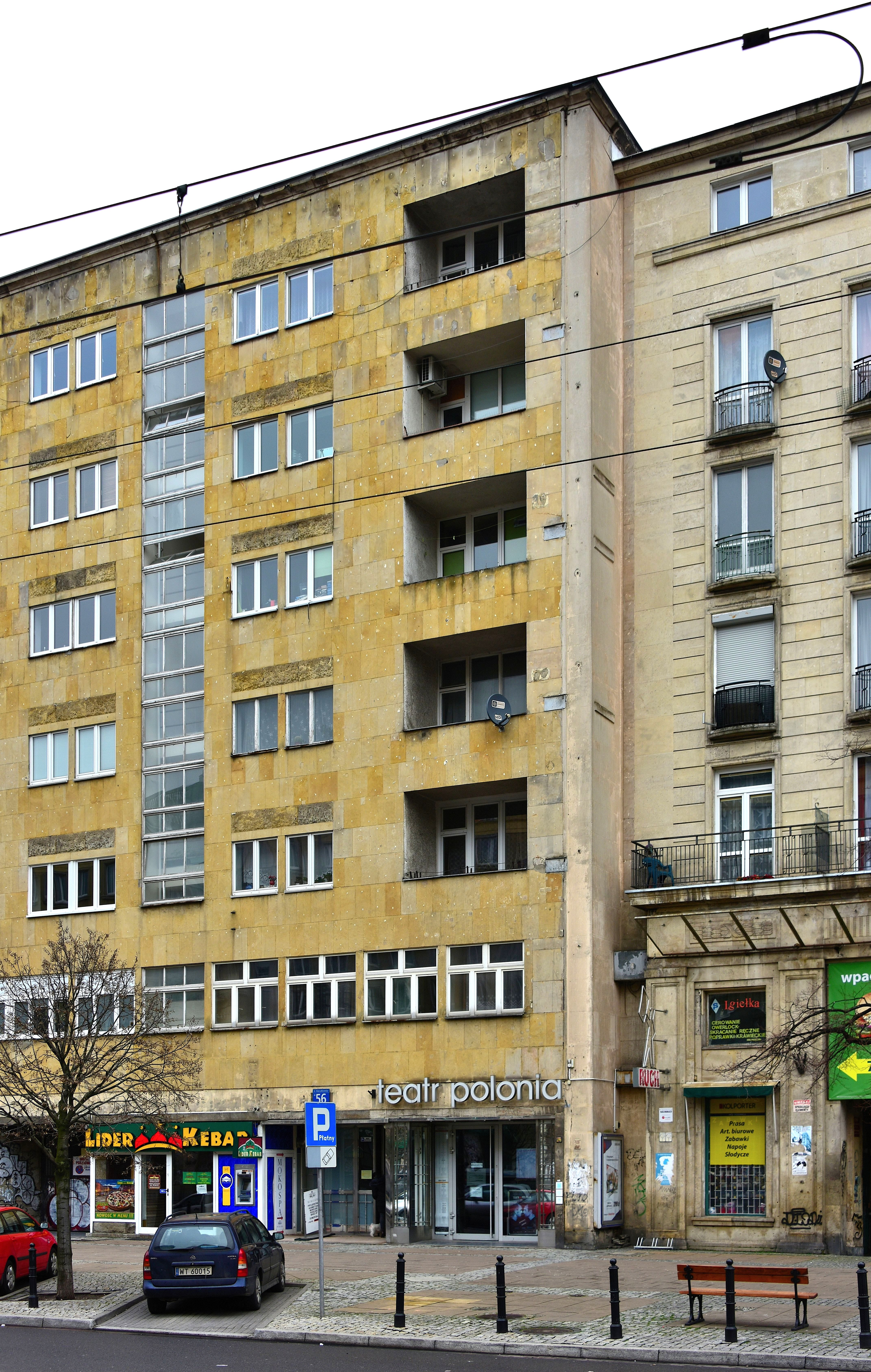 Kamienica przy ul. Marszałkowskiej 56 w Warszawie